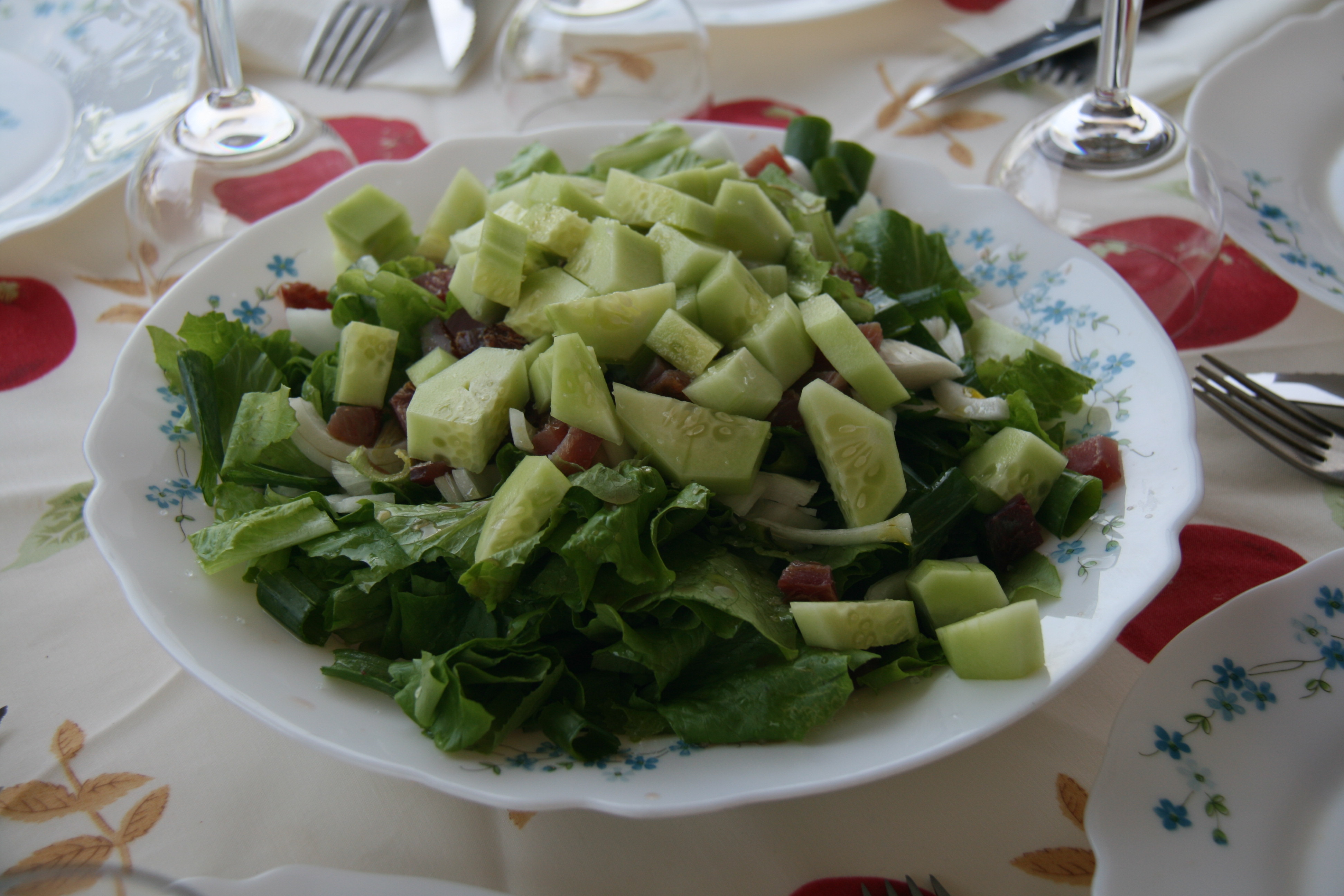 ensalada de pepino